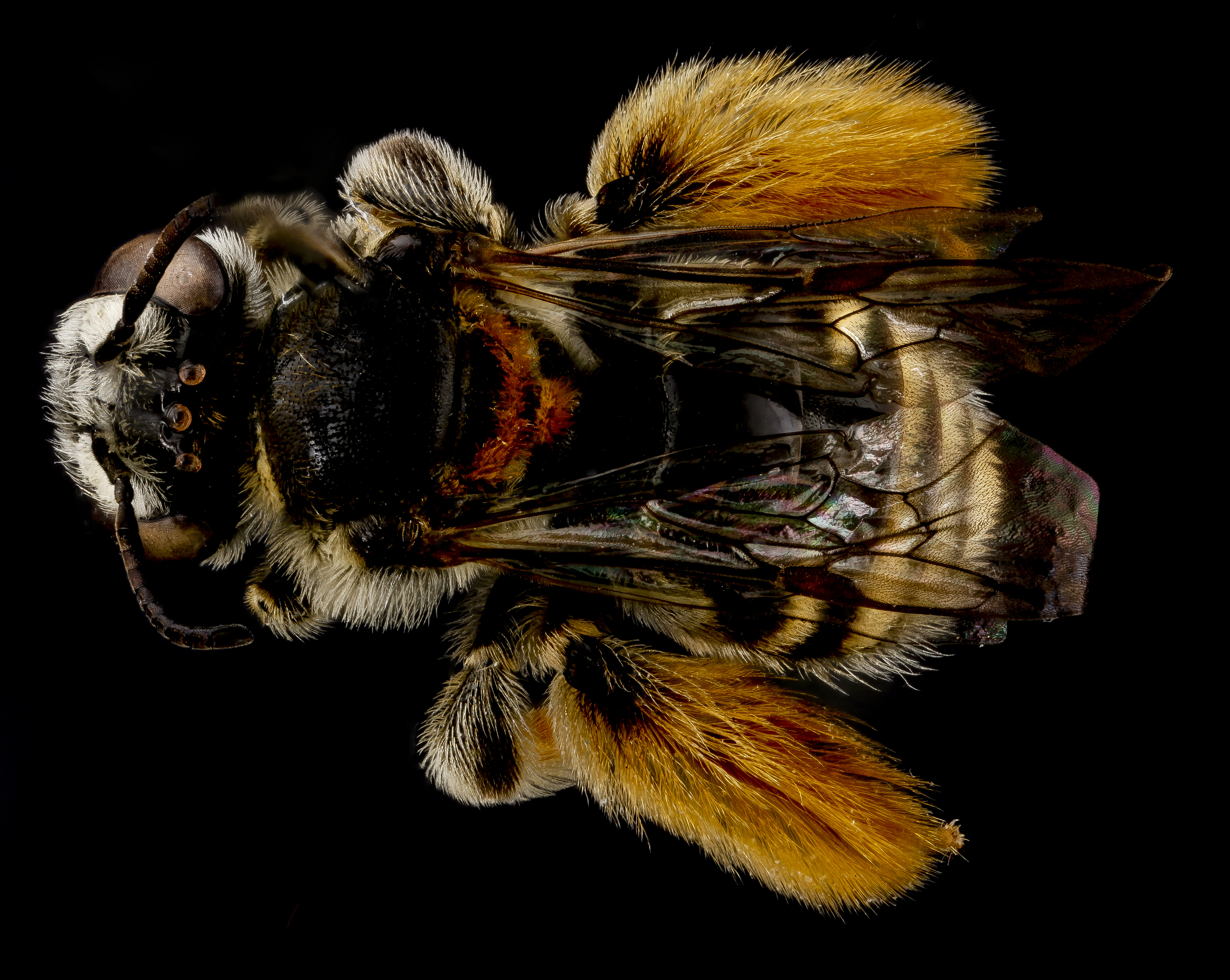 Cuba, GTMO, Guantanamo Bay